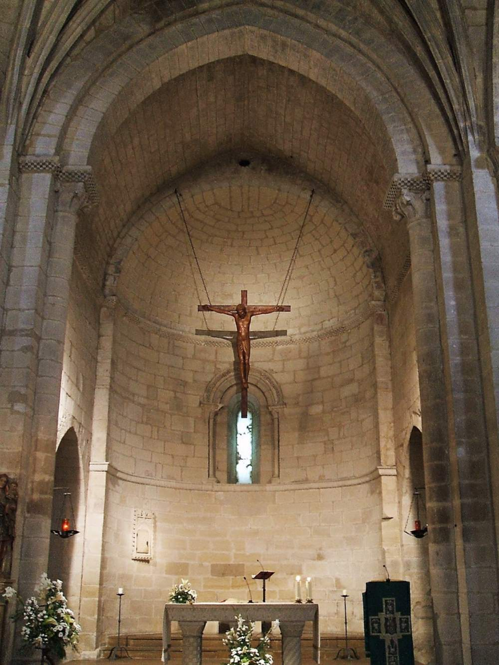 Iglesia de San Bartolomé, Logroño (La Rioja)